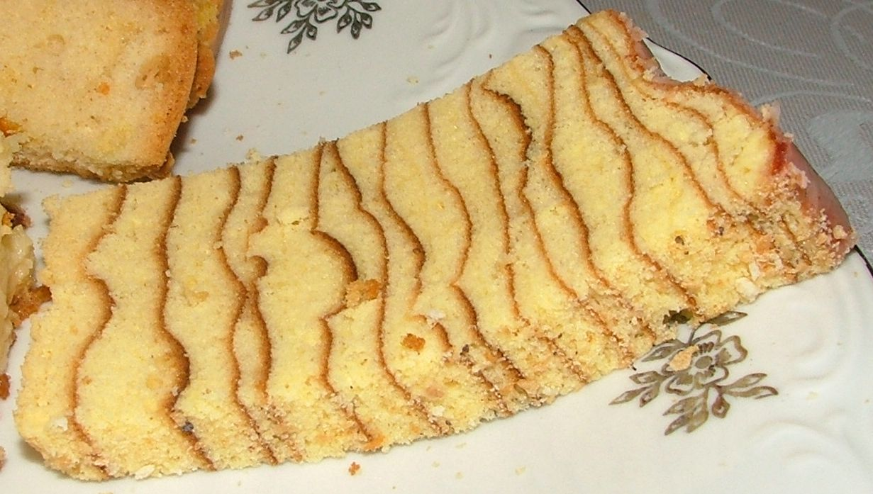 Sękacz